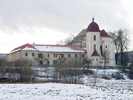 augustiniánský klášter ve Svaté Dobrotivé u Zaječova